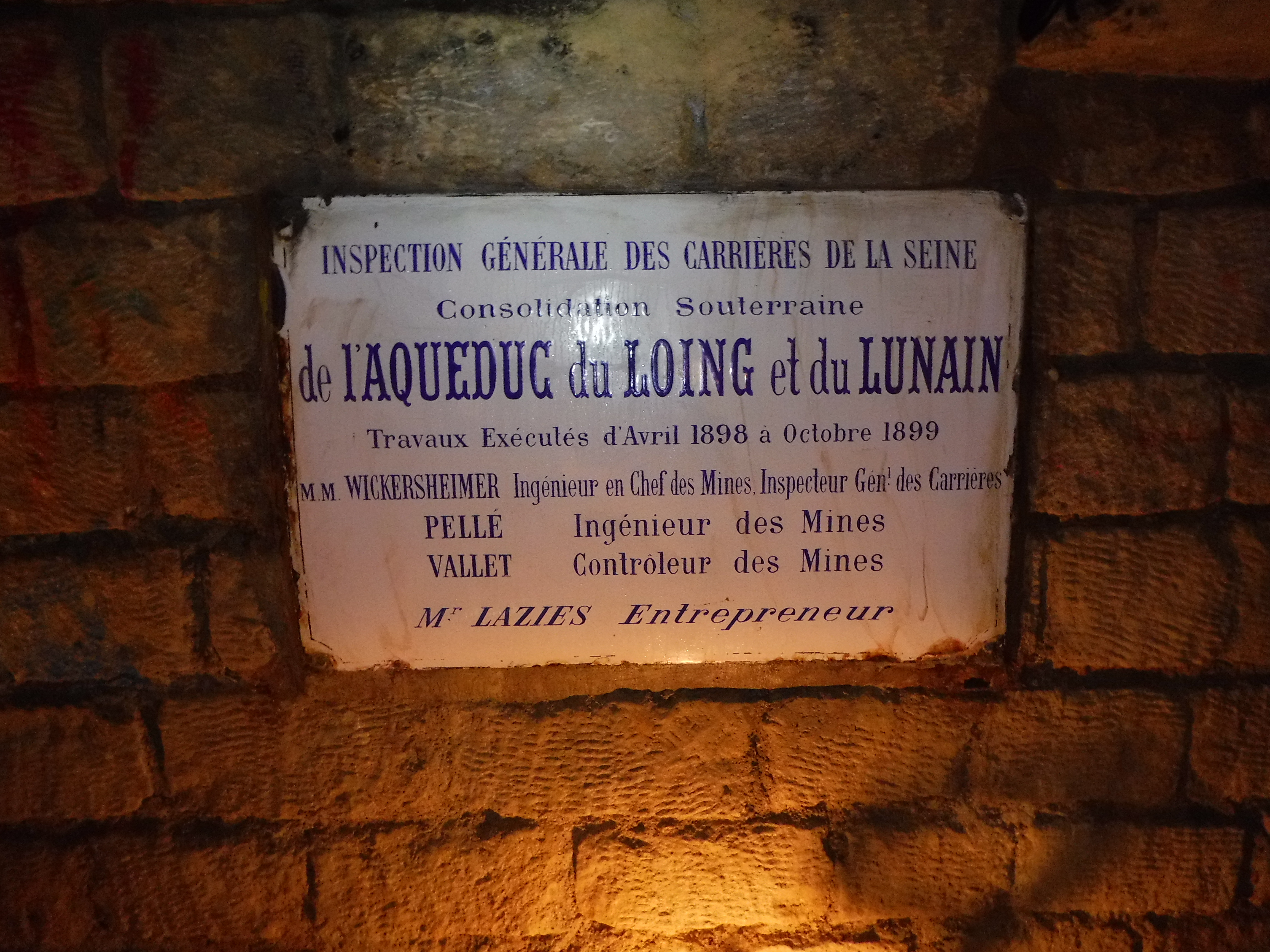 Plaque émaillée de l'aqueduc du Loing et du Lunain, conçu par Charles Wickerscheimer